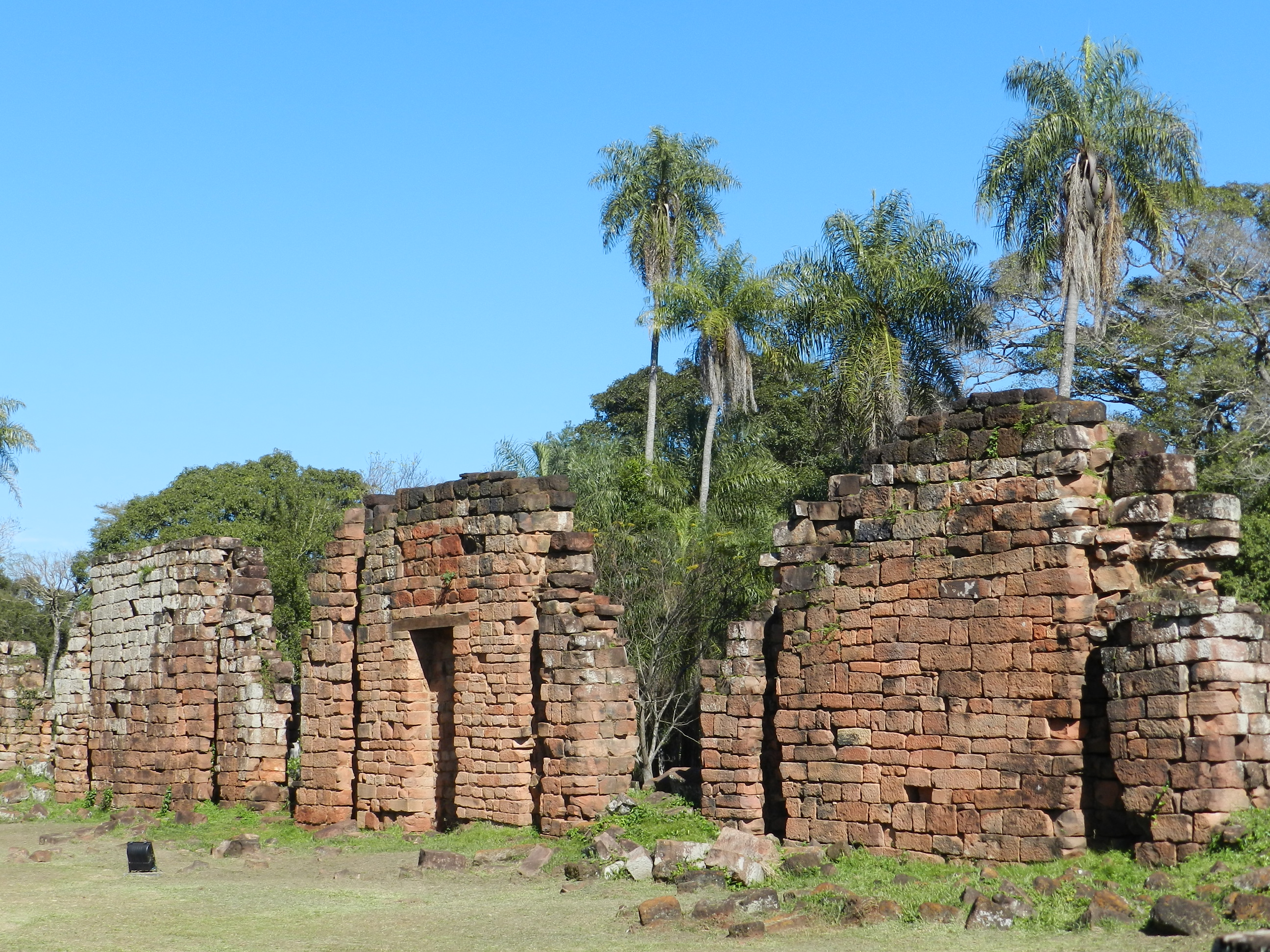 Conjunto Jesuítico de Santa Ana